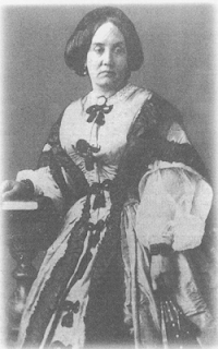 Rosa Guerra